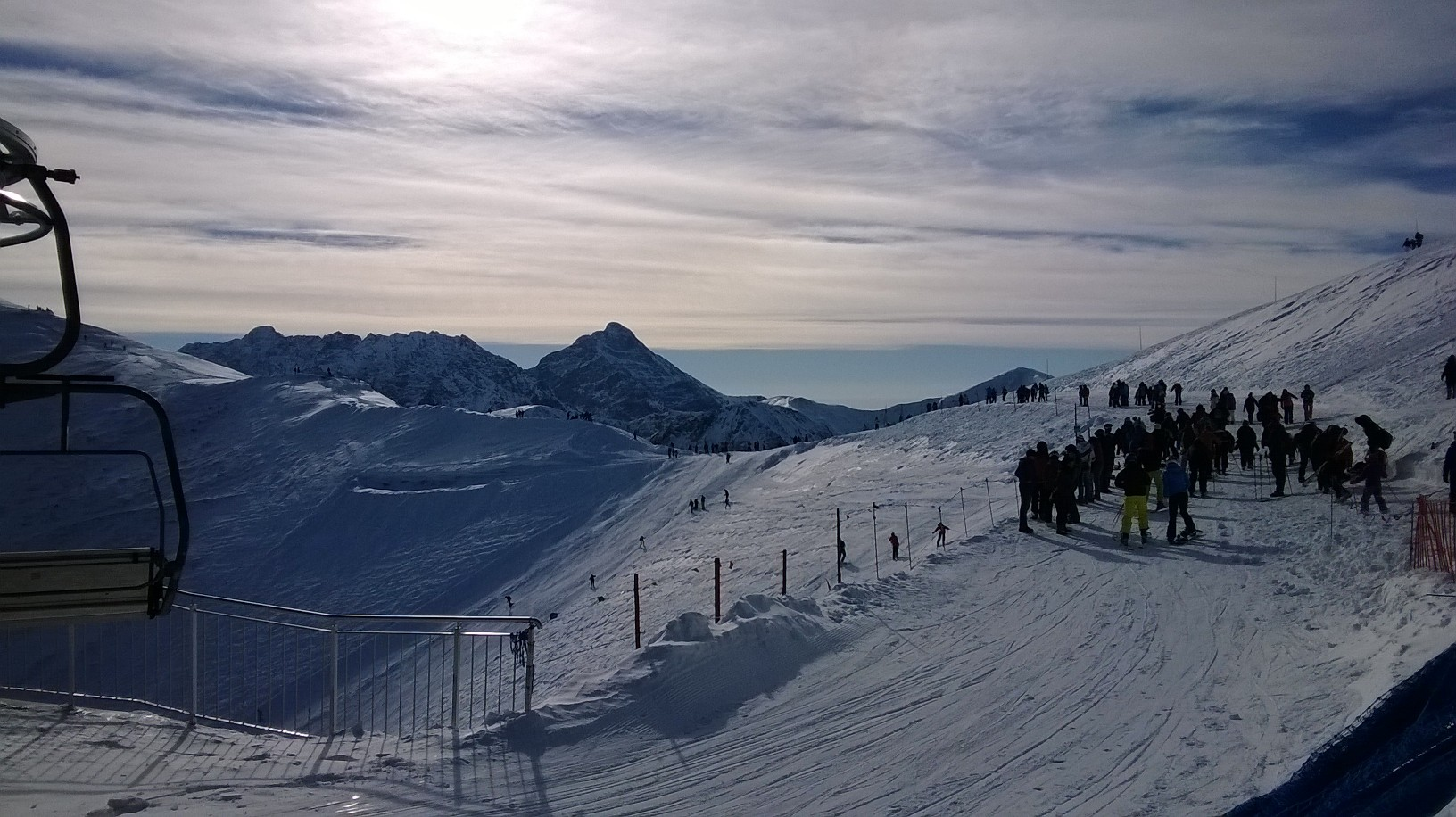 Kasprowy Wierch This is a photography of protected area with CRFOP ID PL.ZIPOP.1393.PN.14